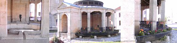 Photo montage de la Fontaine-Lavoir de Semmadon